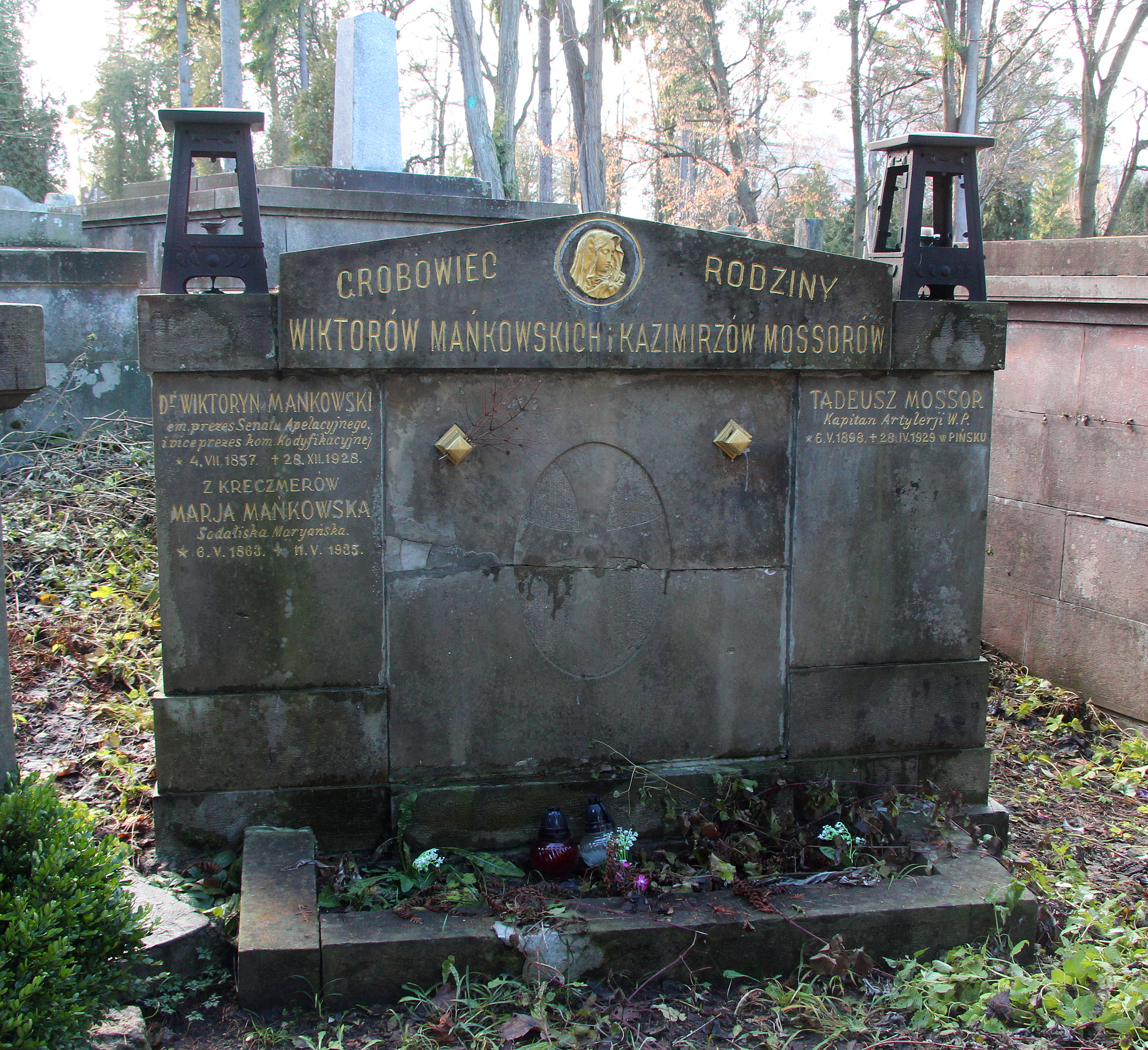 Гробівець родин Маньковських та Моссорів.Личаківський цвинтар , поле № 3.